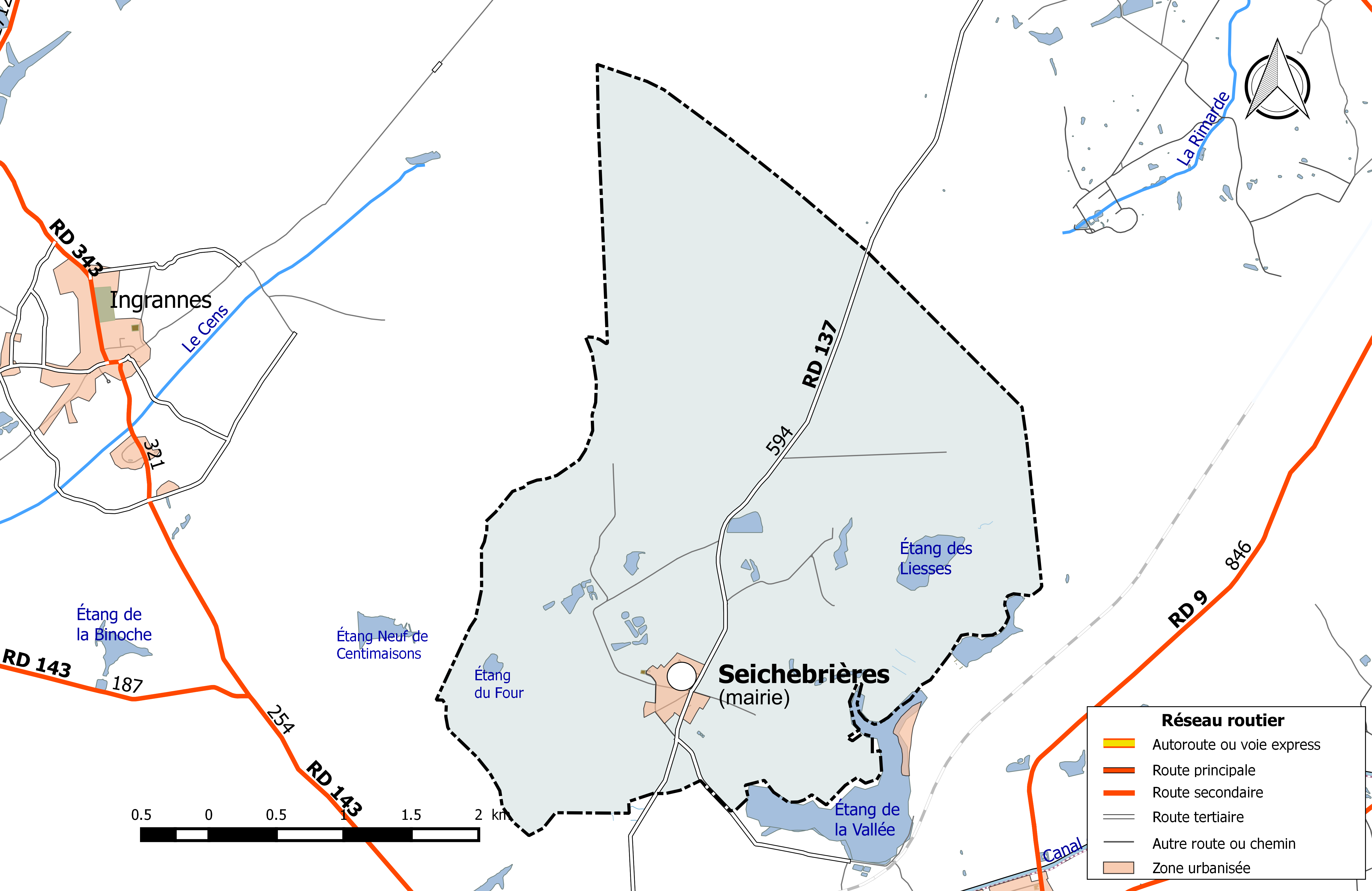 Carte du réseau routier de la commune de Seichebrières.